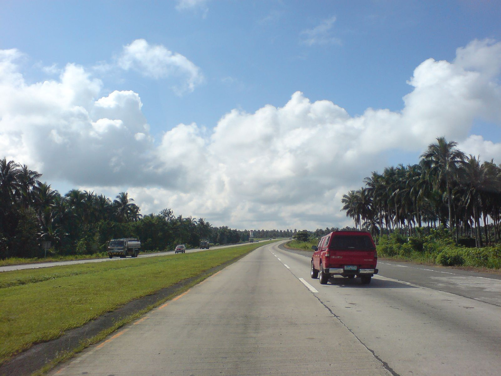 STAR Tollway −